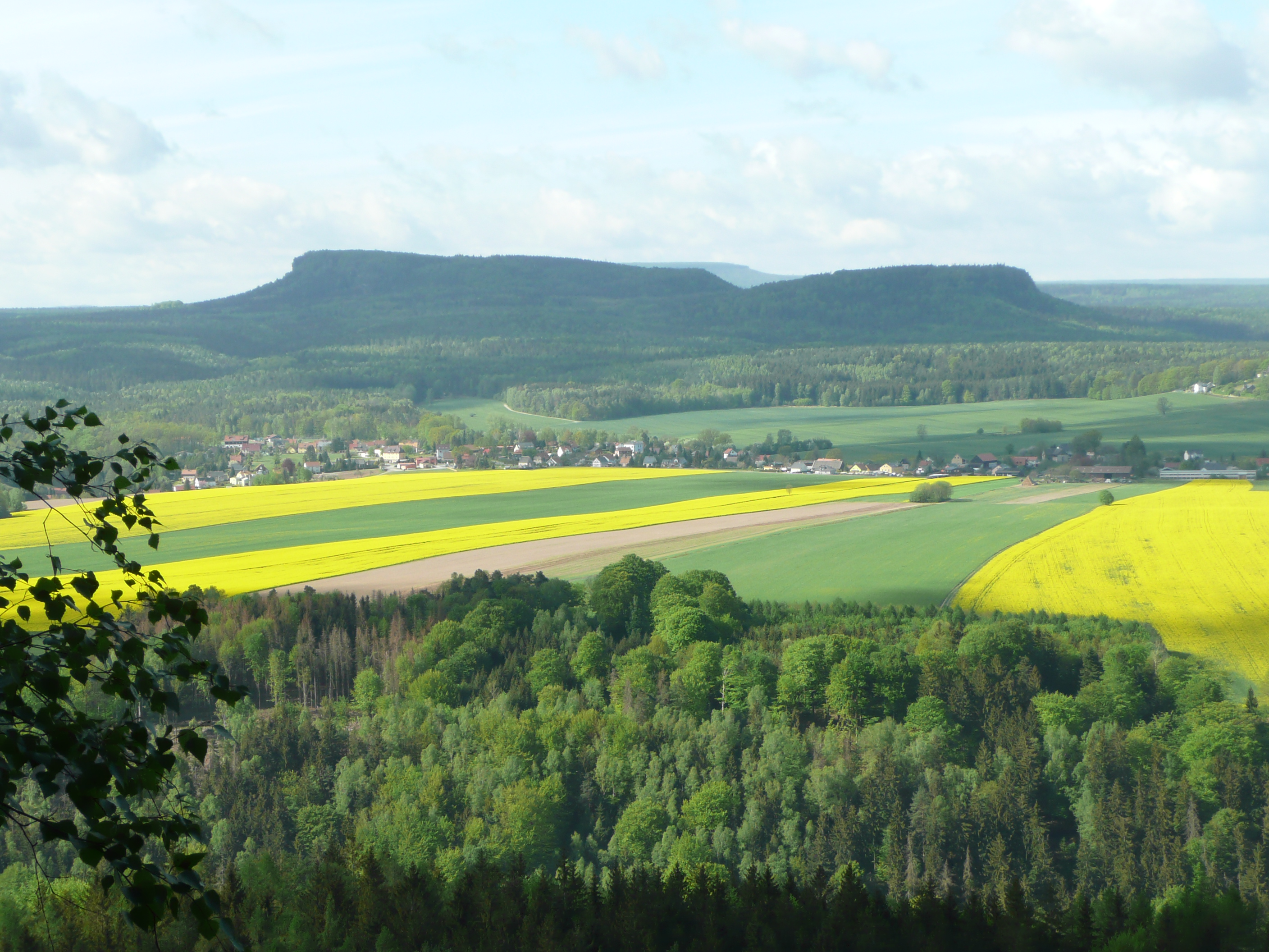 Blick auf Zschirnsteine über die Elbe vom Gratweg aus